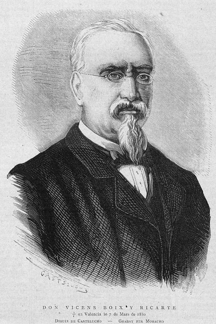 Retrato de Vicens Boix y Ricarte, recogido en la revista La Ilustració Catalana.